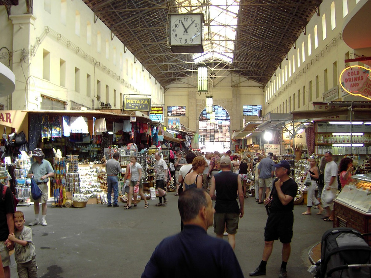 Beschreibung: Markthalle in Chania/Kreta/Griechenland *Quelle: selbst fotografiert *Fotograf: Stefan Petri - *Datum: 06.06.2005